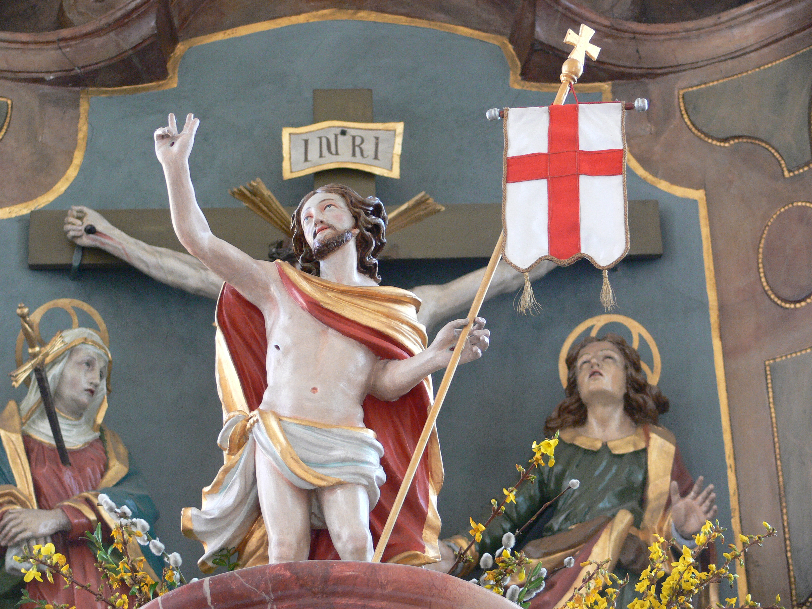 Pfarrkirche St. Konrad und Vinzenz, Fronhofen, Gemeinde Fronreute, Landkreis Ravensburg Hochaltar, Detail: Christus als Sieger über den Tod mit Siegesfahne (Christ's Victory over Death)